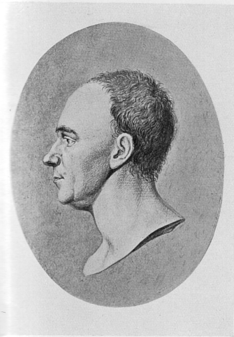 Johann Bernhard Basedow . Bleistiftzeichnung Georg Friedrich Schmolls, am 13. Juli 1774 in Bad Ems angefertigt. Vgl.: Lavaters Tagebuch der Lahnreise, Einträge vom 13. Juli 1774. Gegensinnig als Kupferstich in den PF 2 vor Seite 272 abgebildet.